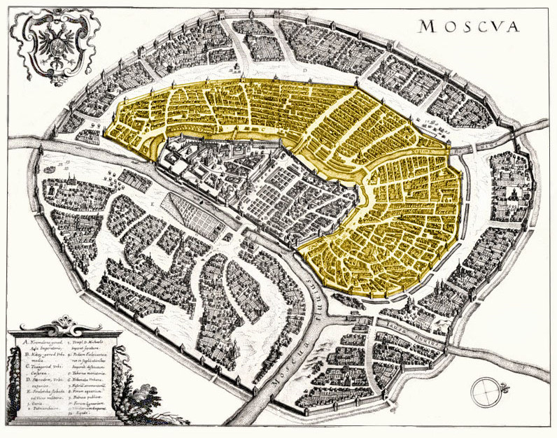 На карте Москвы Маттеуса Мериана (1638 года) жёлтым цветом показан Белый город. Он окружает Кремль и Китай-город. Вокруг Белого города - Земляной город.